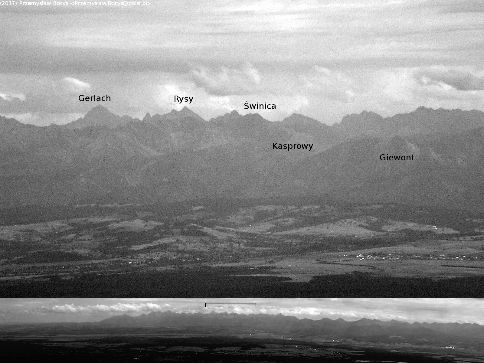 Widok znanych i często odwiedzanych wierzchołków w Tatrach Wysokich. Na ogólnym widoku Tatr z Babiej Góry (u dołu) zaznaczono obszar, który został powiększony u góry.